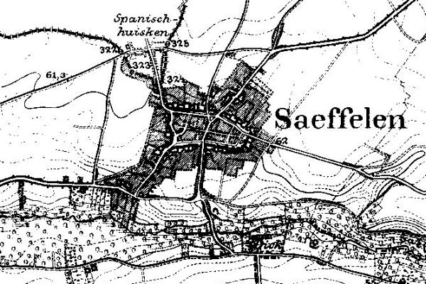 Neuaufnahme 1891 -1912